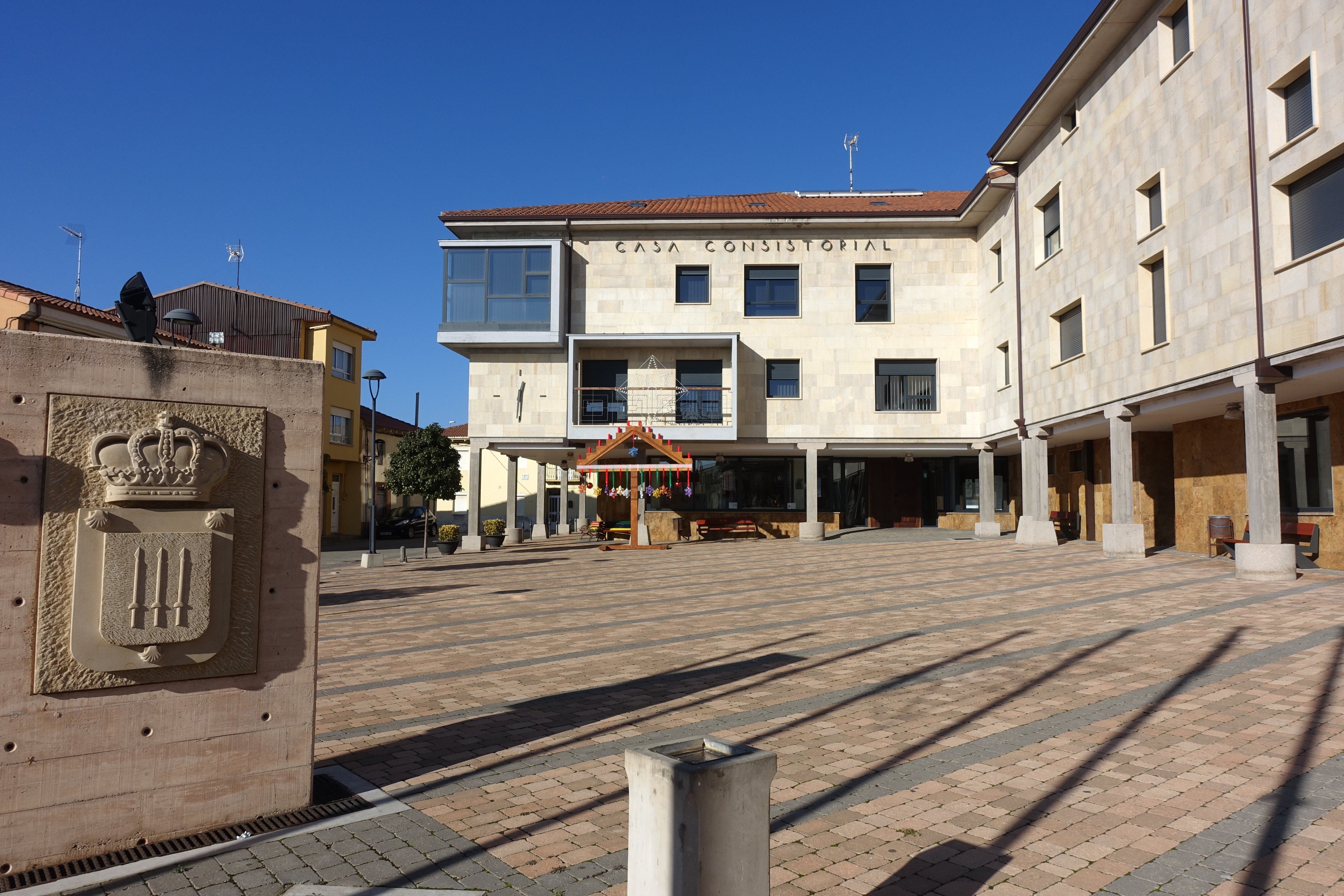 Casa consistorial de Villadangos del Páramo (León, España).